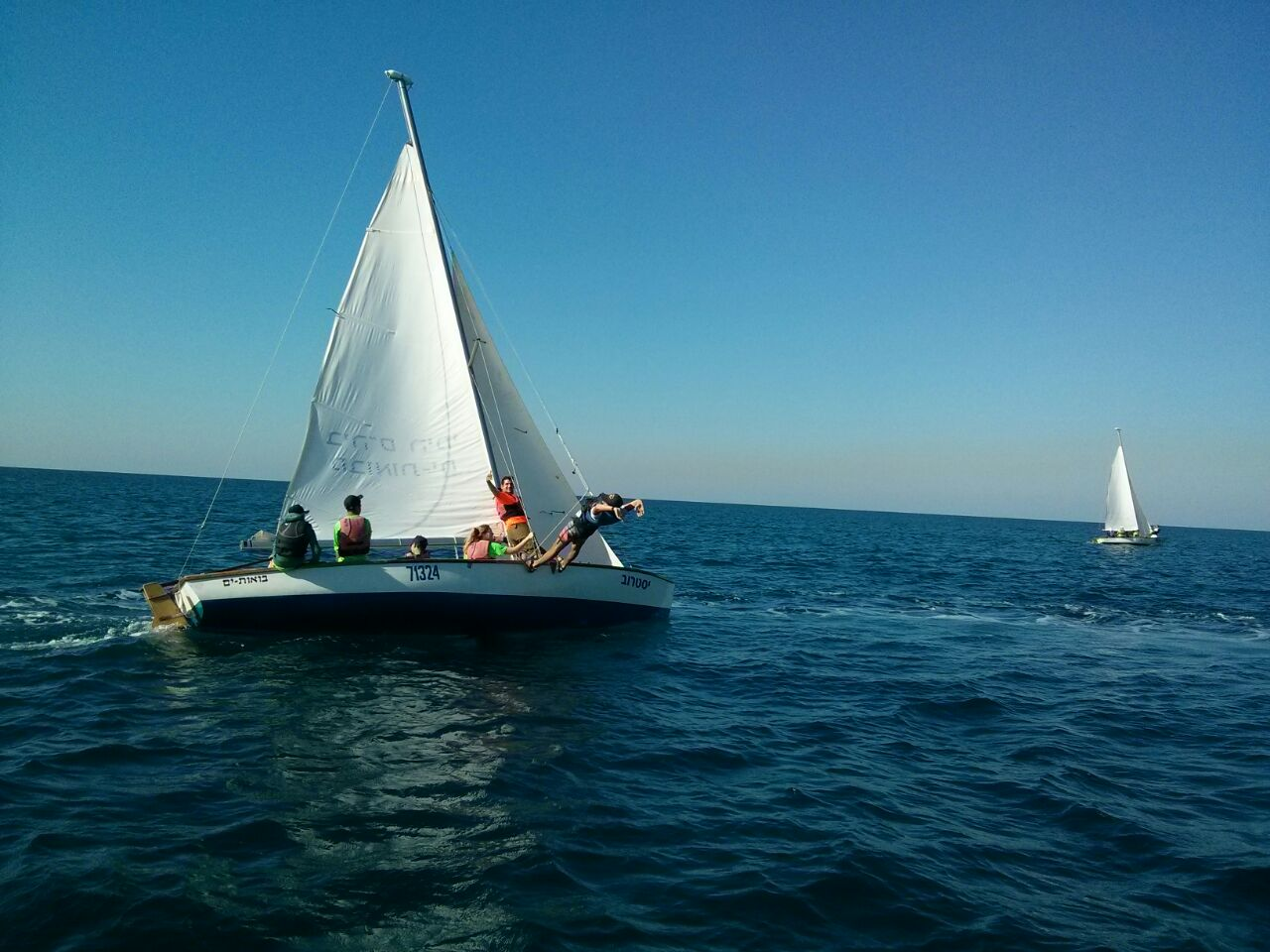 מפרשית בהפלגה. "יסטרוב" של כפר הנוער הימי "מבואות ים" במהלך הפלגה לשדוד-ים מול ארובות חדרה, צולם 2014